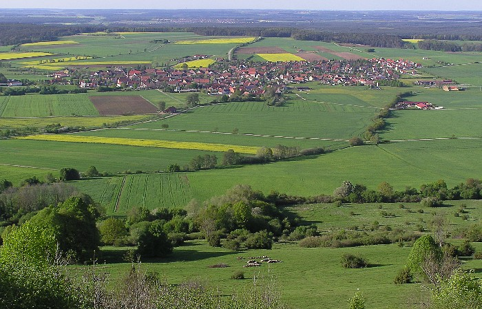 Ehingen vom Hesselberg aus gesehen Fotograf: Oswald Engelhardt